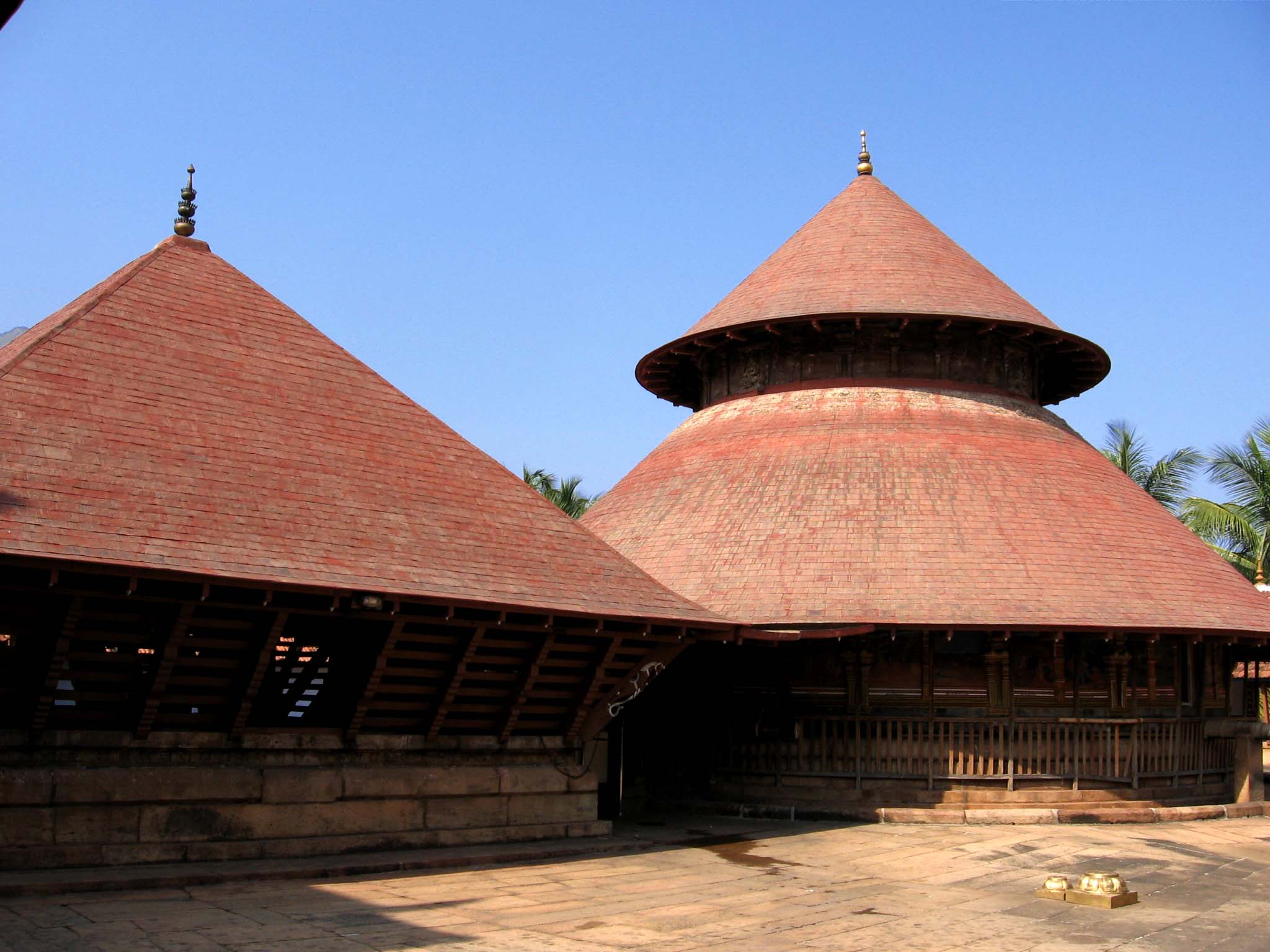 കാച്ചാംകുറിശ്ശി മഹാവിഷ്ണു ക്ഷേത്രം ശ്രീകോവിൽ.